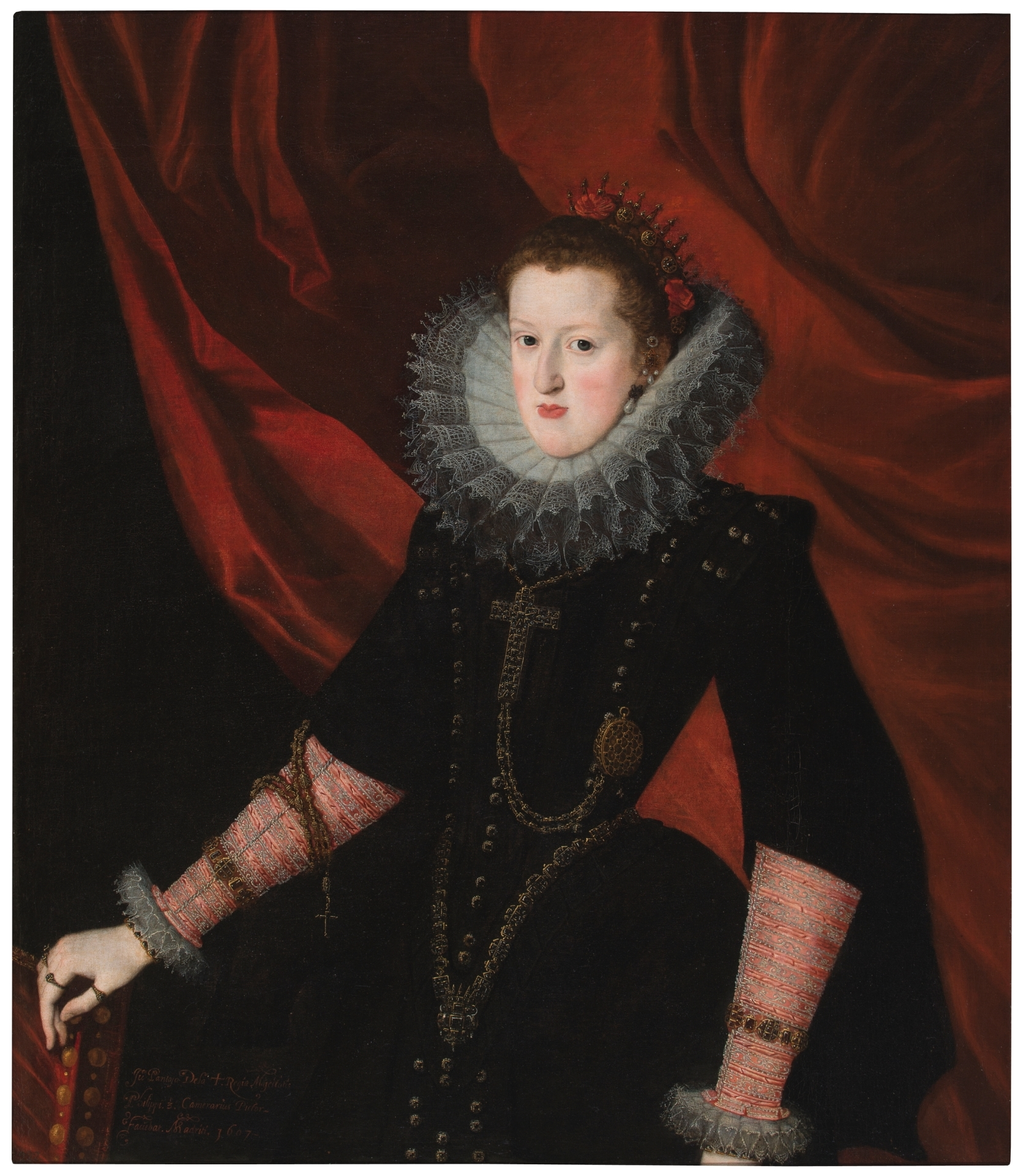 A rainha Margarida da Áustria